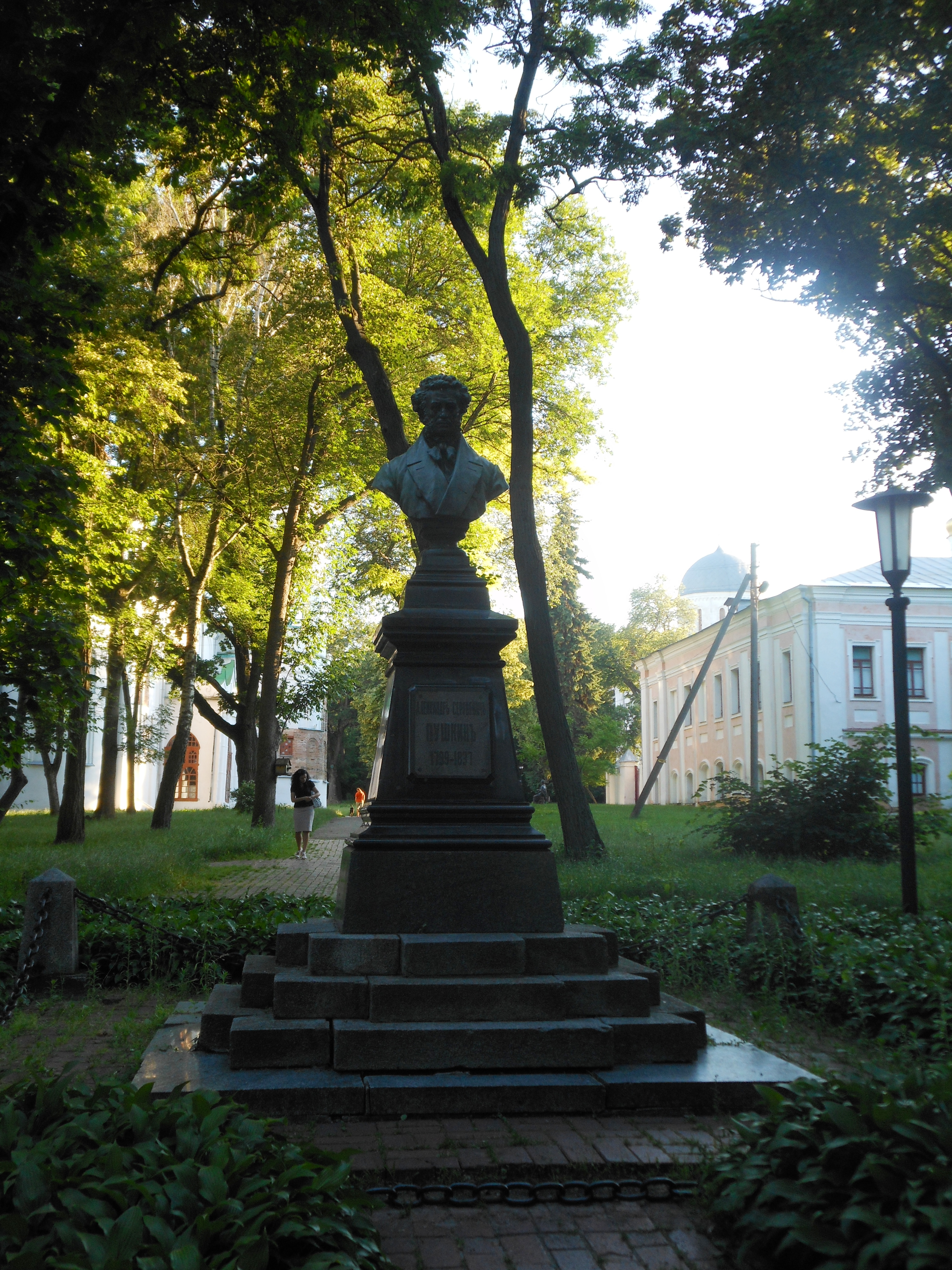 Пам'ятник О.С. Пушкіну, Чернігів, територія Валу